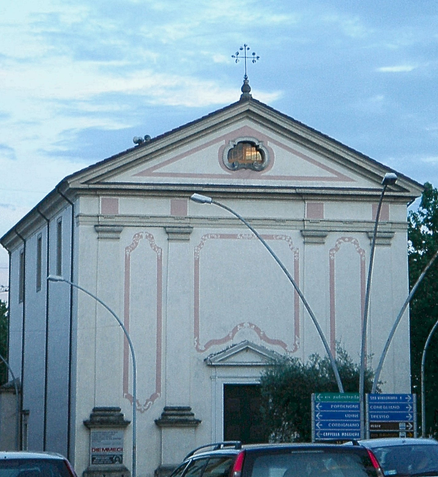 San Giacomo di Veglia (Vittorio Veneto, Treviso, Italia): facciata della chiesa parrocchiale.